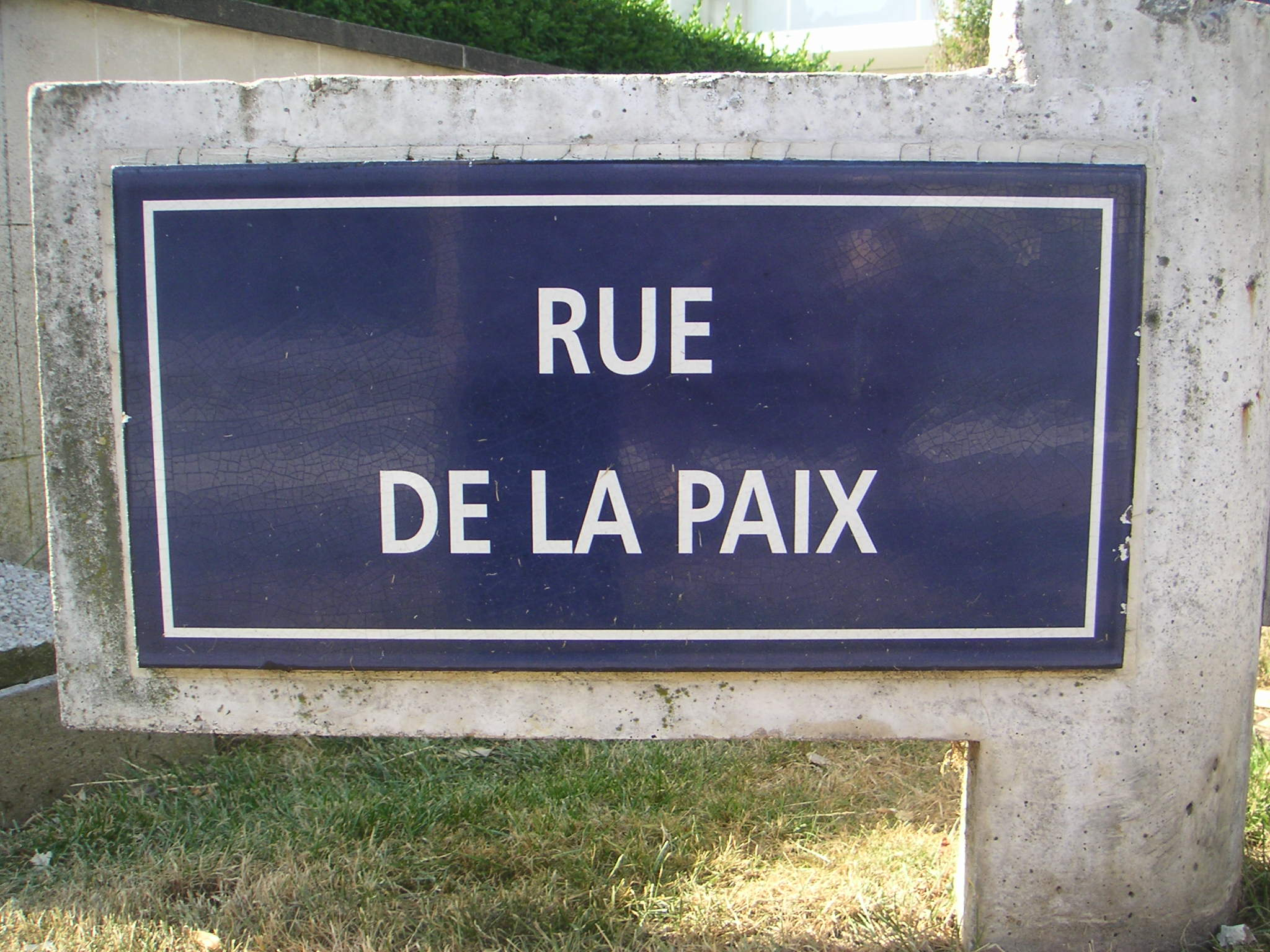 Photos de plaques de rues prises dans la commune du Touquet-Paris-Plage